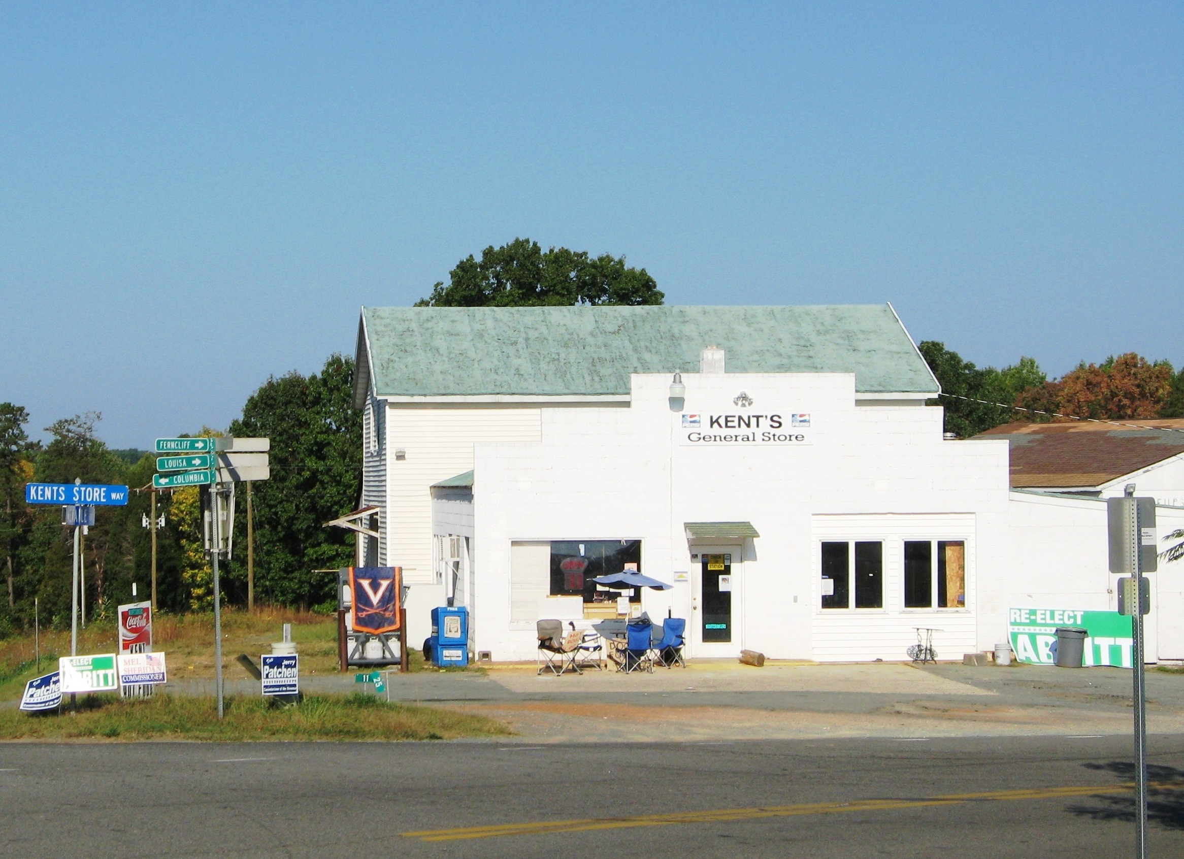 Kents General Store